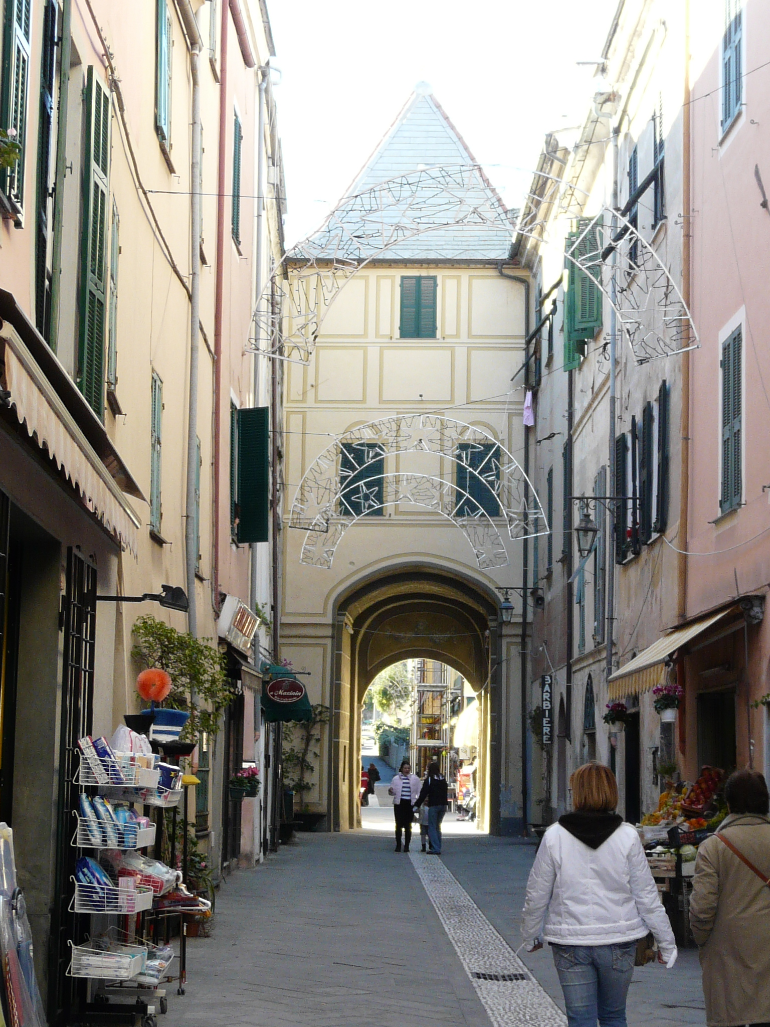 Porta del centro storico di Borghetto Santo Spirito, Liguria, Italia